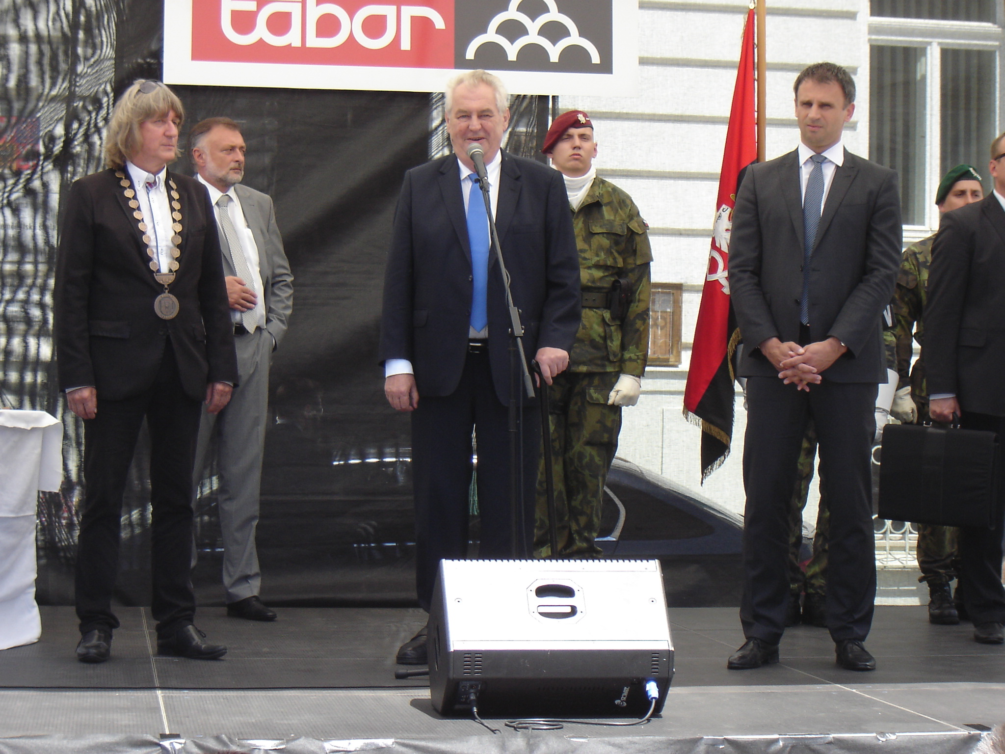 Český prezident Miloš Zeman při projevu na náměstí T. G. Masaryka v Táboře v rámci návštěvy Jihočeského kraje. Vlevo starosta Tábora Jiří Fišer, za ním Jaroslav Hlinovský (ředitel Sekretariátu prezidenta republiky/tajemník prezidenta republiky), vpravo hejtman kraje Jiří Zimola.